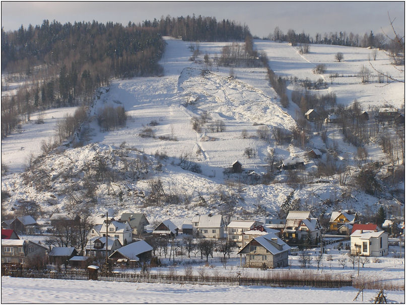 Osuwisko w Lachowicach - okoliczne zniszczenia sposowodowane przez osuwisko - lipiec 2001 r. Fotografia udostępniona przez Giraff camelopardalis 19:54, 10 mar 2005 (CET) na bazie licencji GNU FDL.